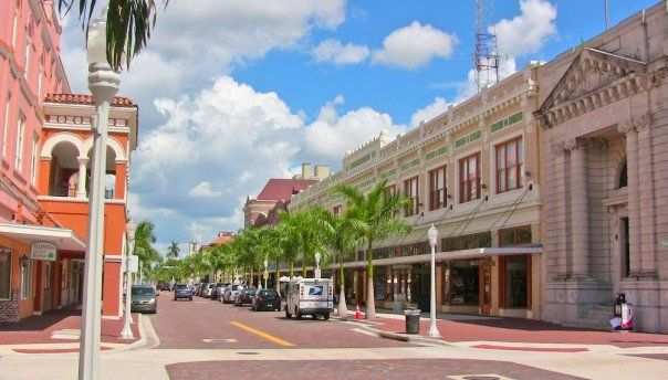 포트마이어스 시내